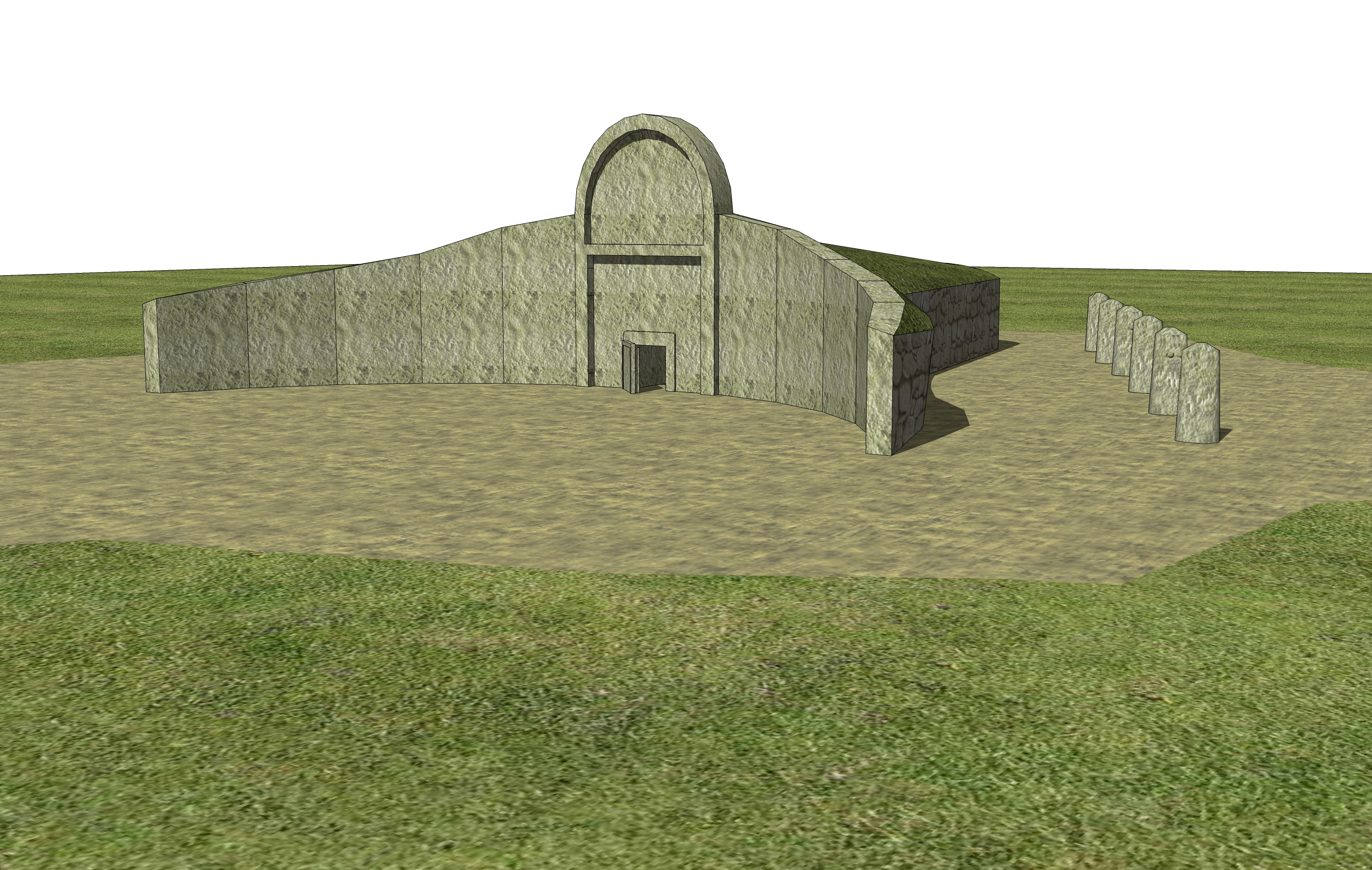 Modello 3D della tipologia di Tomba dei Giganti ad esedra con arco centinato.